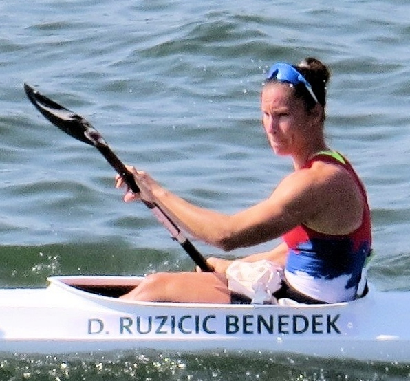 Sx50